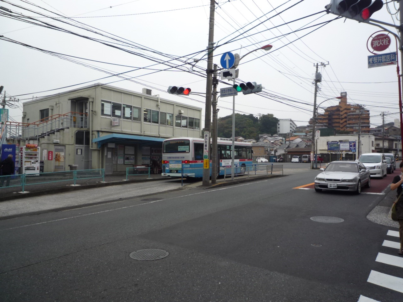 京急バス衣笠営業所の写真